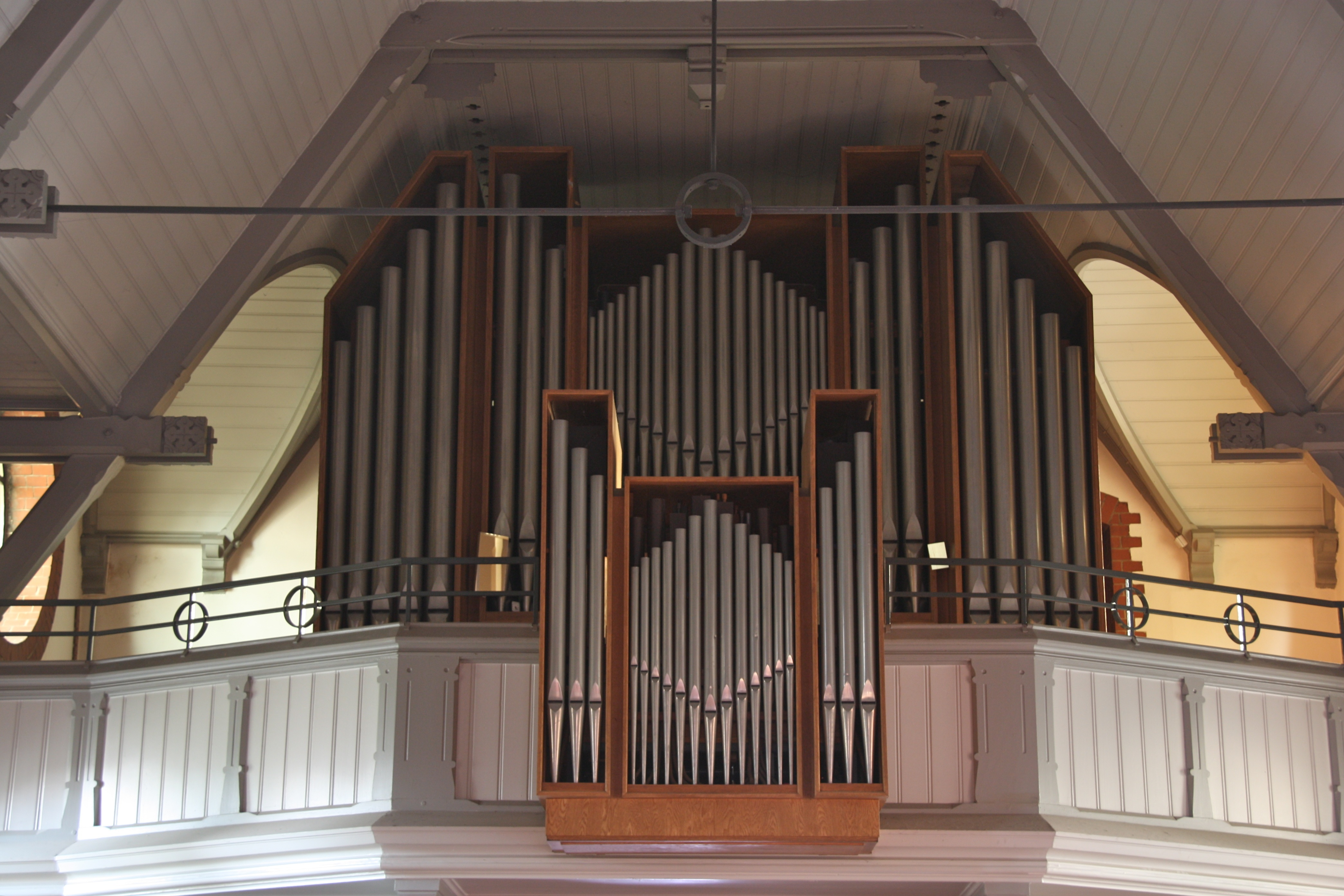 Hamburg-Eidelstedt, Elisabethkirche, Orgelprospekt, Orgelbau Führer 1964